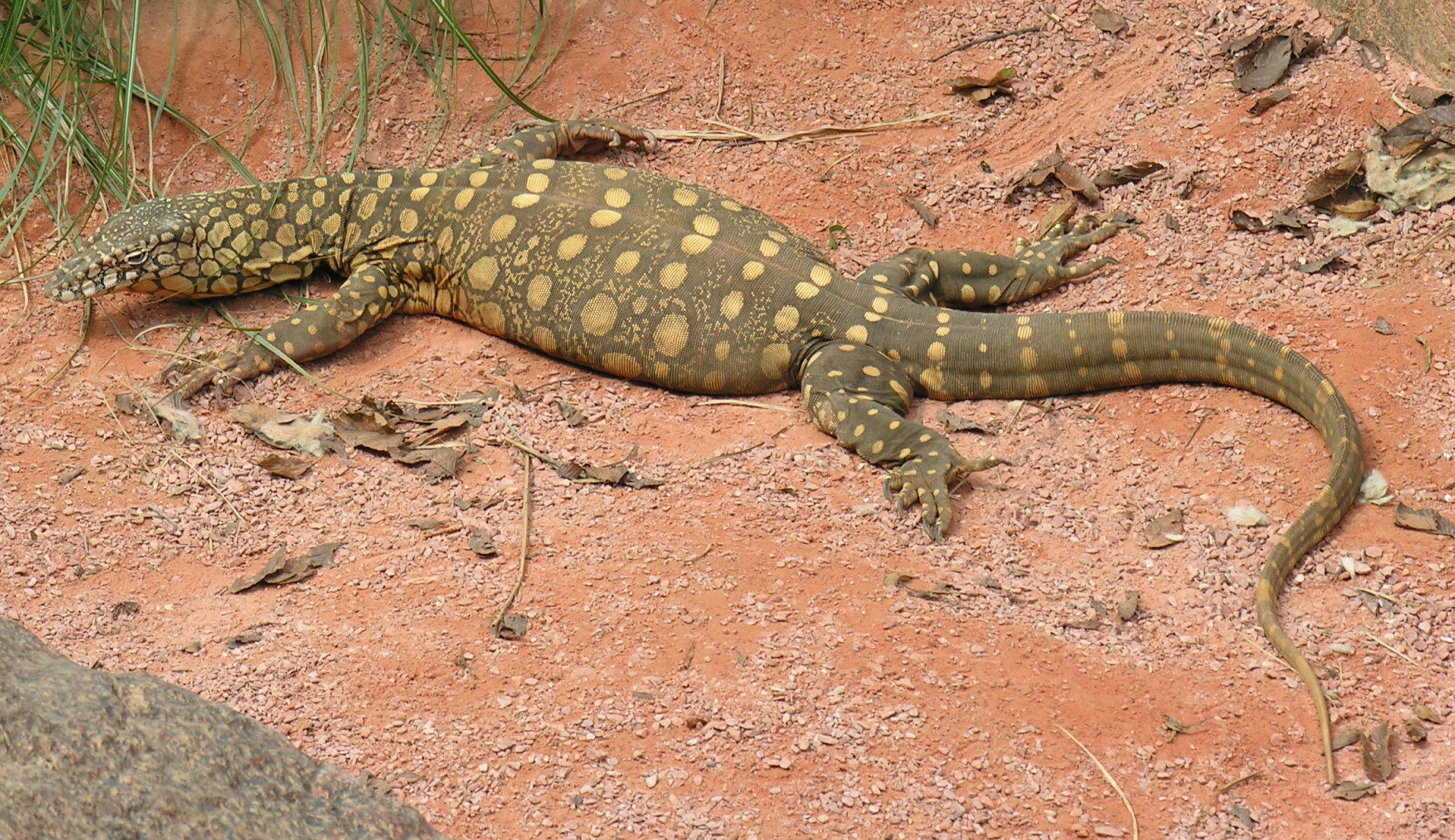 perentie monitor lizard, Dallas Zoo, Texas / 2007